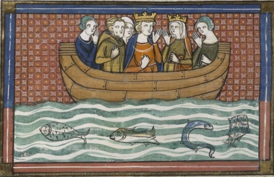 Richard Coeur de Lion naviguant